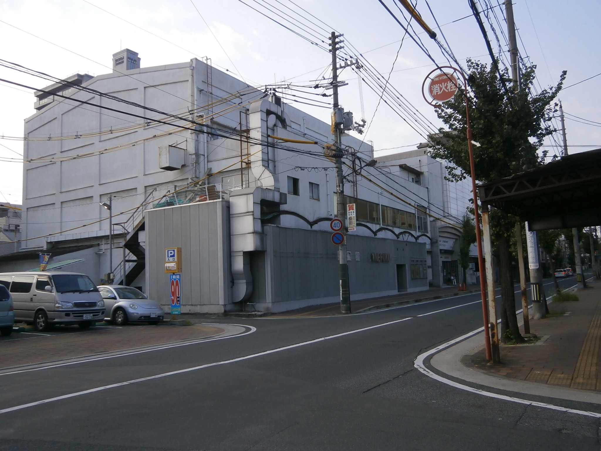 広島県福山市にあったシネフク大黒座の外観。2014年に閉鎖された。